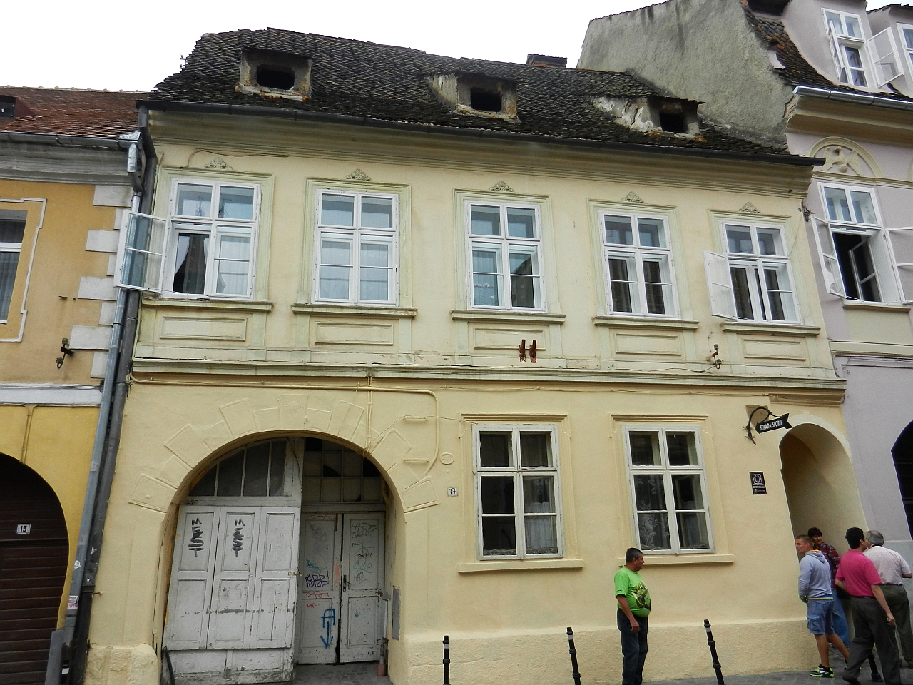 Casă monument istoric